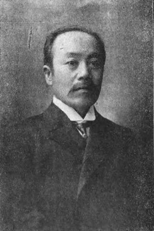 呉文聡（1851-1918）